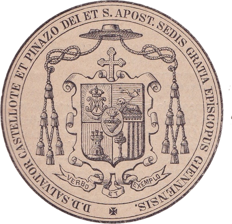 Heráldica de D. Salvador Castellote y Pinazo, Obispo de Jaén (1901-1906)